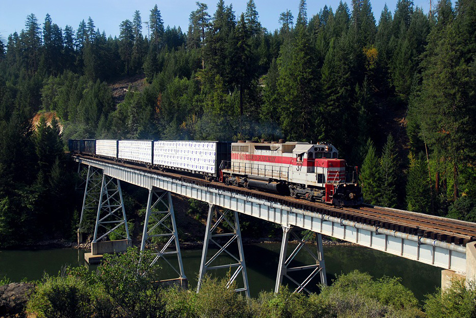 37 lake britton june 27